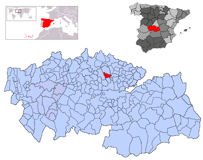 Arcicóllar en la provincia de Toledo